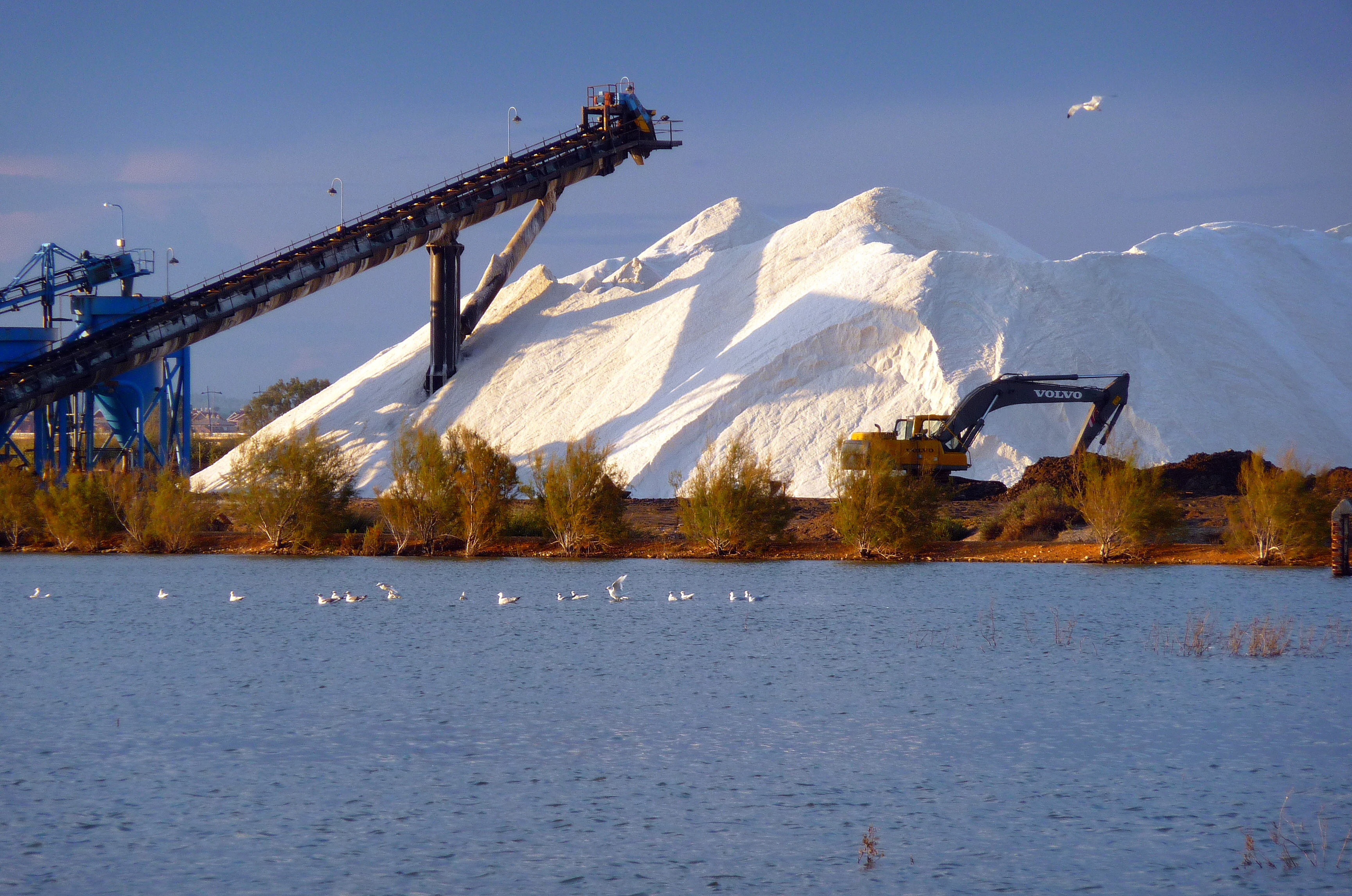 Explotación de salinas en Marismas del Odiel, Huelva (España).